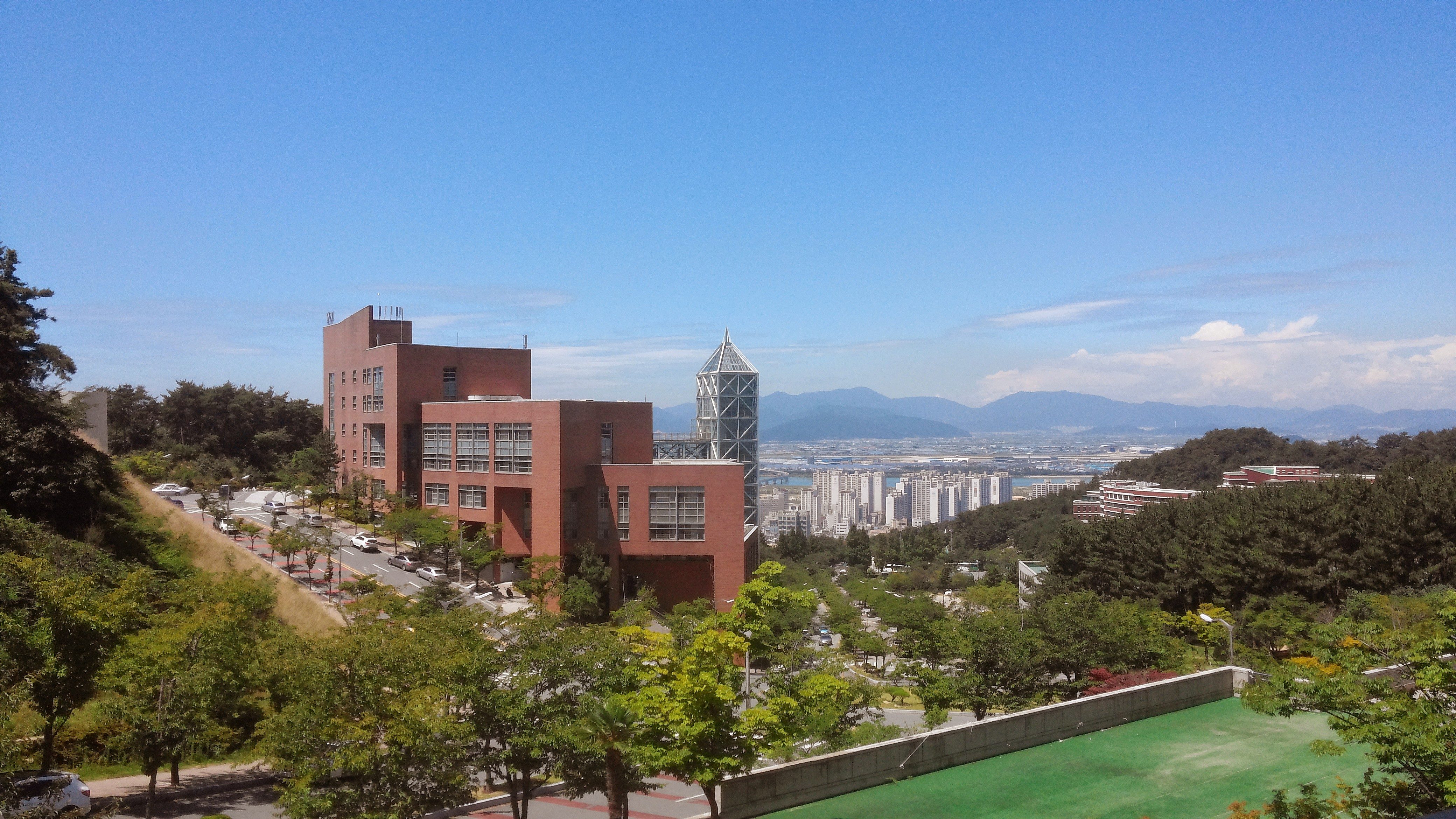 신라대학교 공학관 전경